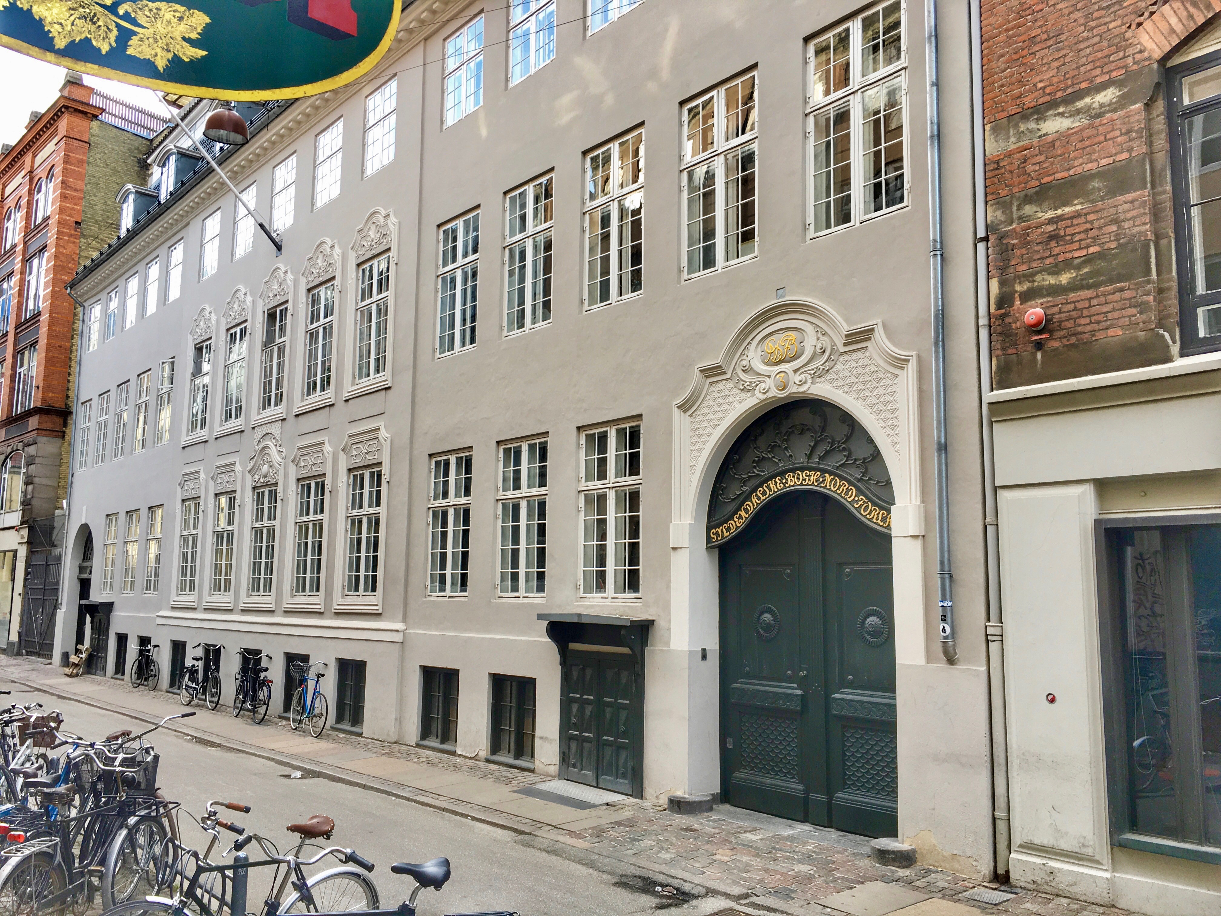 Gyldendals Forlag i Klareboderne, København